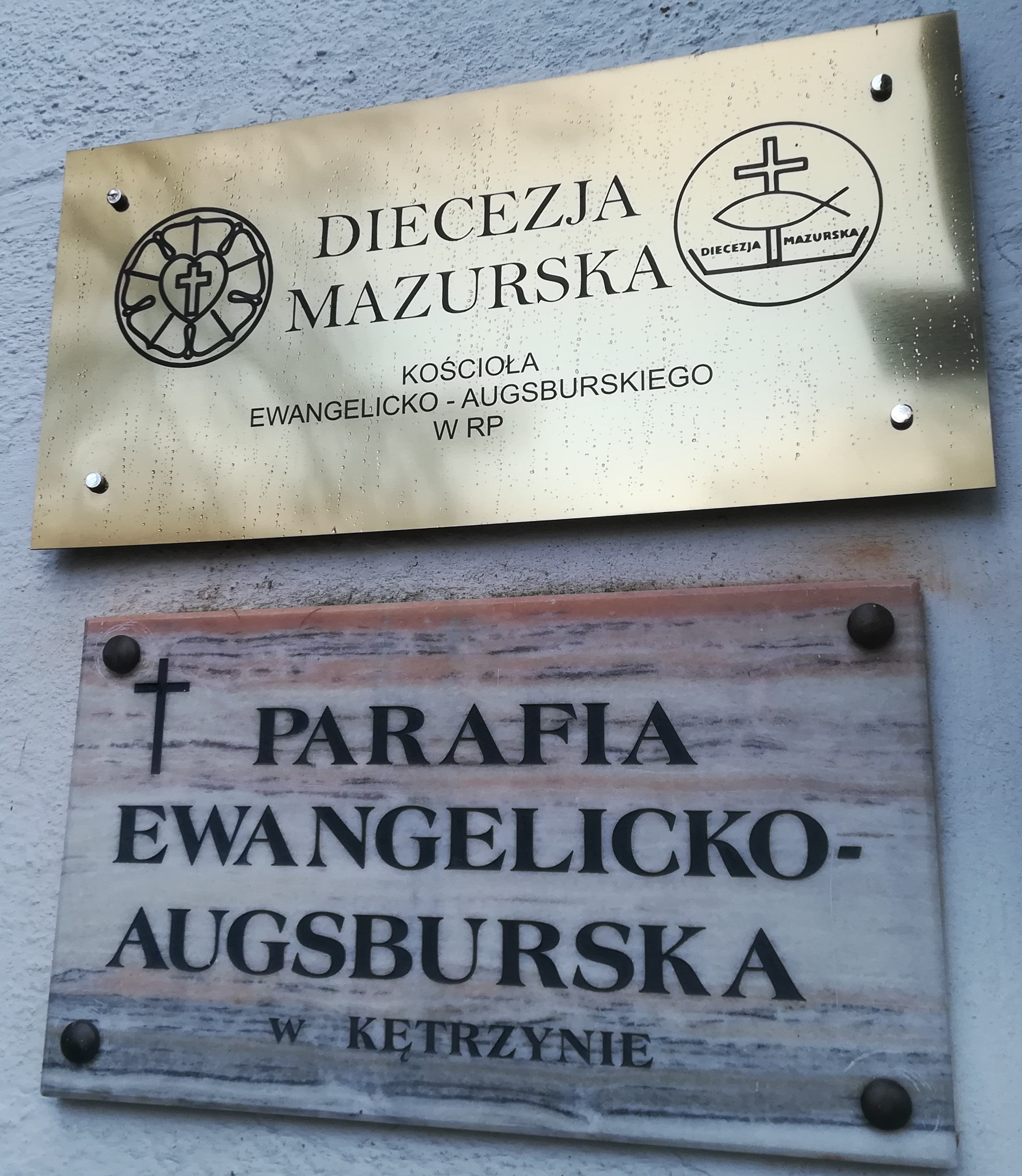 Kościół ewang. św. Jana w Kętrzynie.